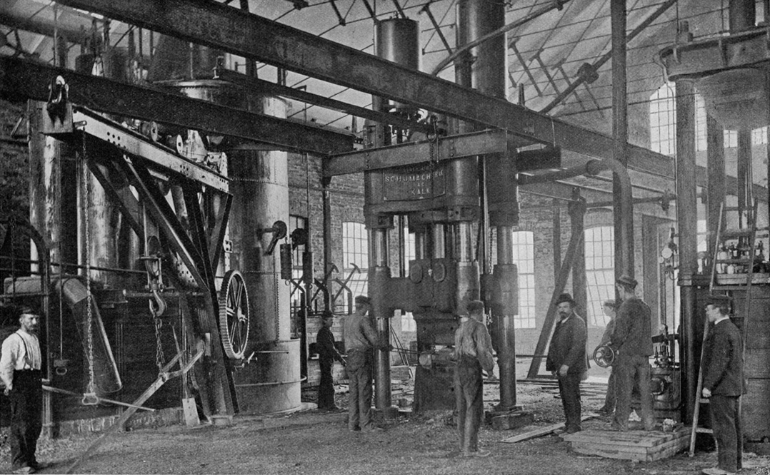 Kohlswa jernverk, arbetare vid press